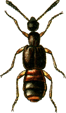 This file has been extracted from another file: Jacobs13.jpg